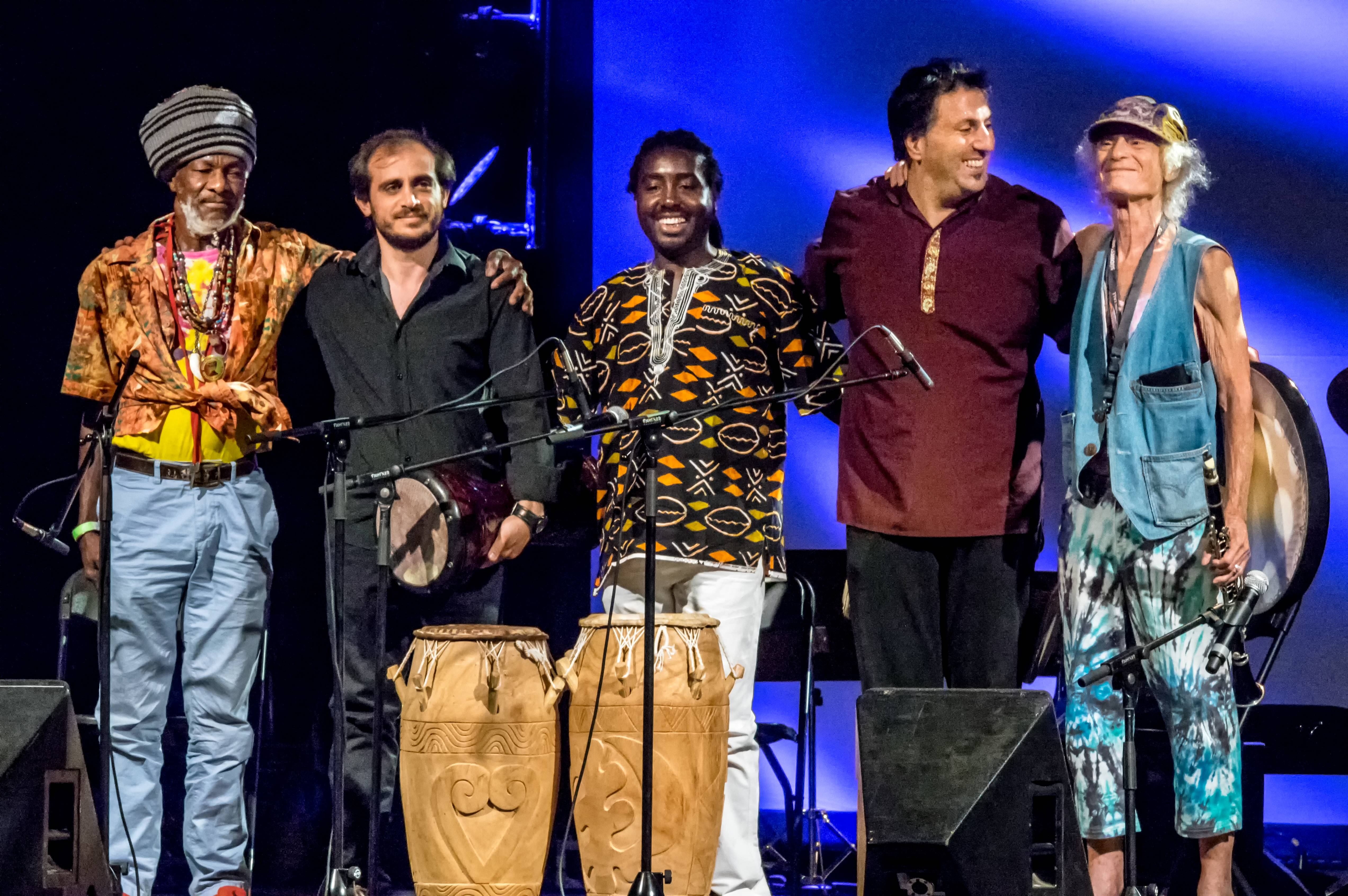 Bilder vom ZMF 2015 Die Gala am 12. 07. 2015